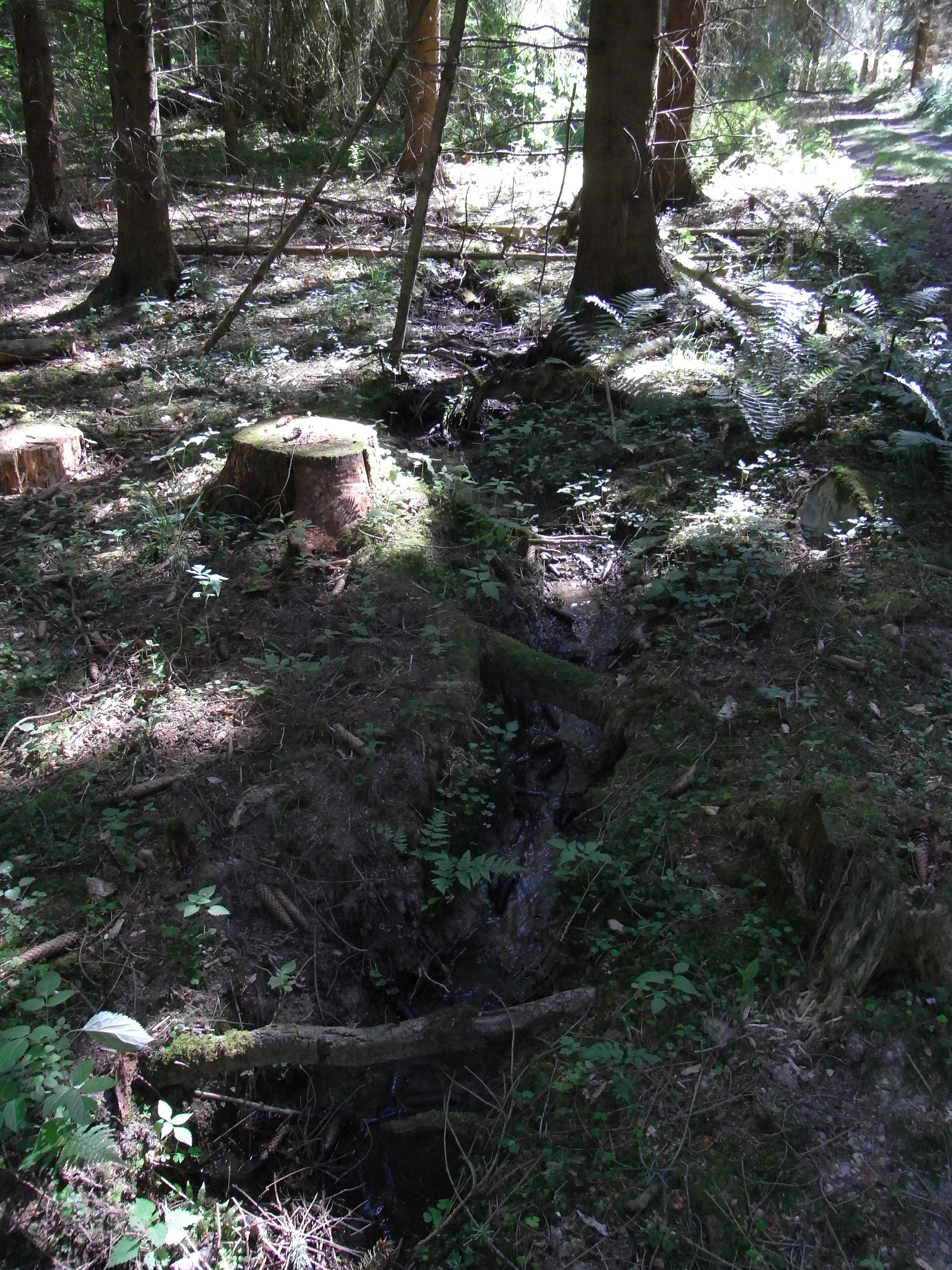 Vor dem Überqueren des Wegs an der alten Quelle fließt der Bach durch einen Nadelwald